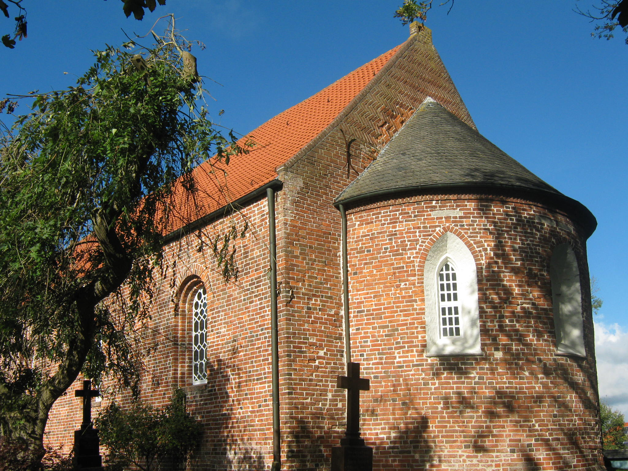 Apsis der Kirche in Dunum, Ostfriesland, Niedersachsen, Deutschland, 220/1230 (Dehio Bremen/Niedersachsen 1992)